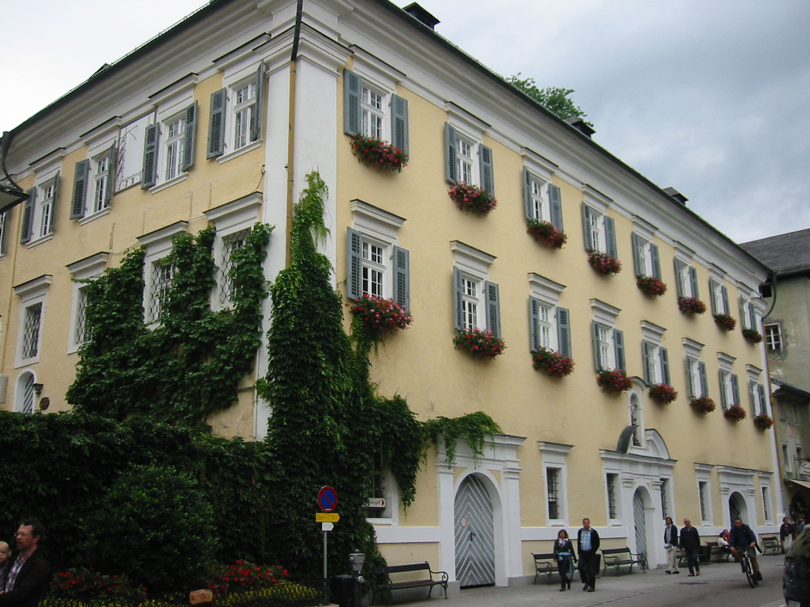 Schloss und ehem. Pfarrhof